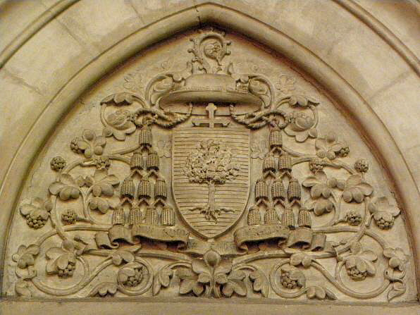 Armoiries de Mgr de Cabrières. Collatéral gauche du choeur de la cathédrale Saint-Pierre de Montpellier (34).